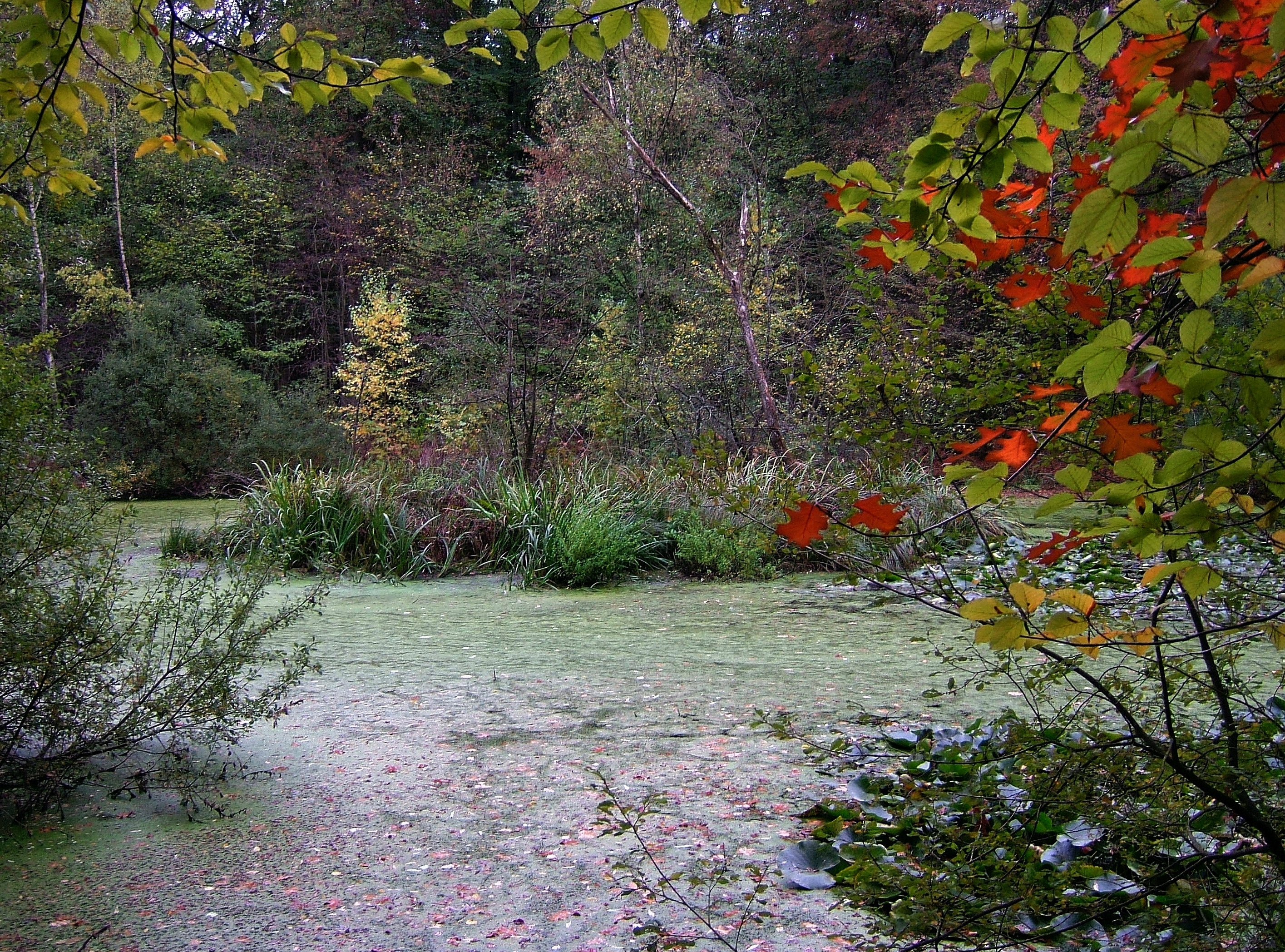 Rehsprungmaar im Kottenforst (Gemarkung Röttgen) im Herbst